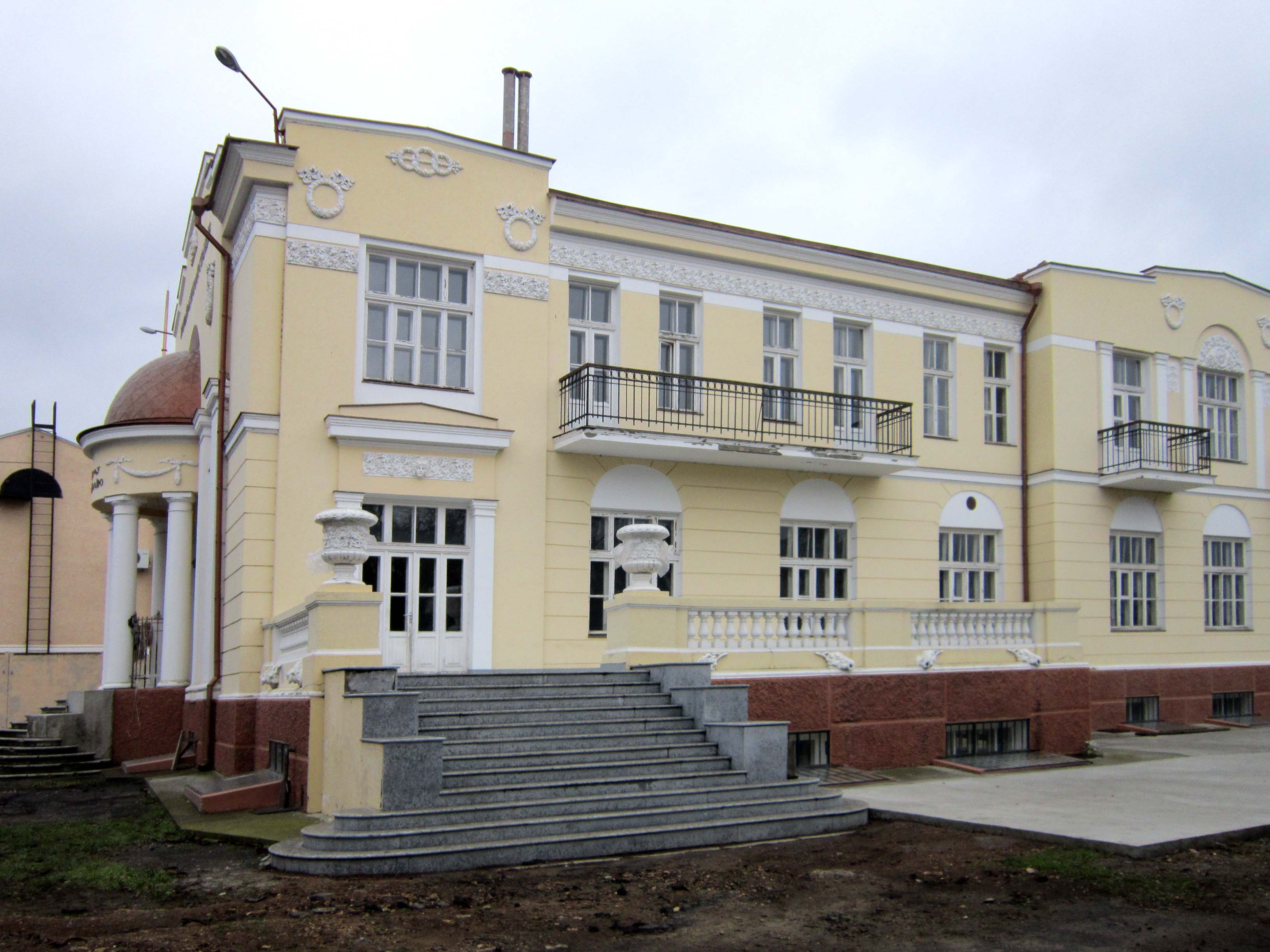 Особняк Таїрова, смт смт. Таїрове